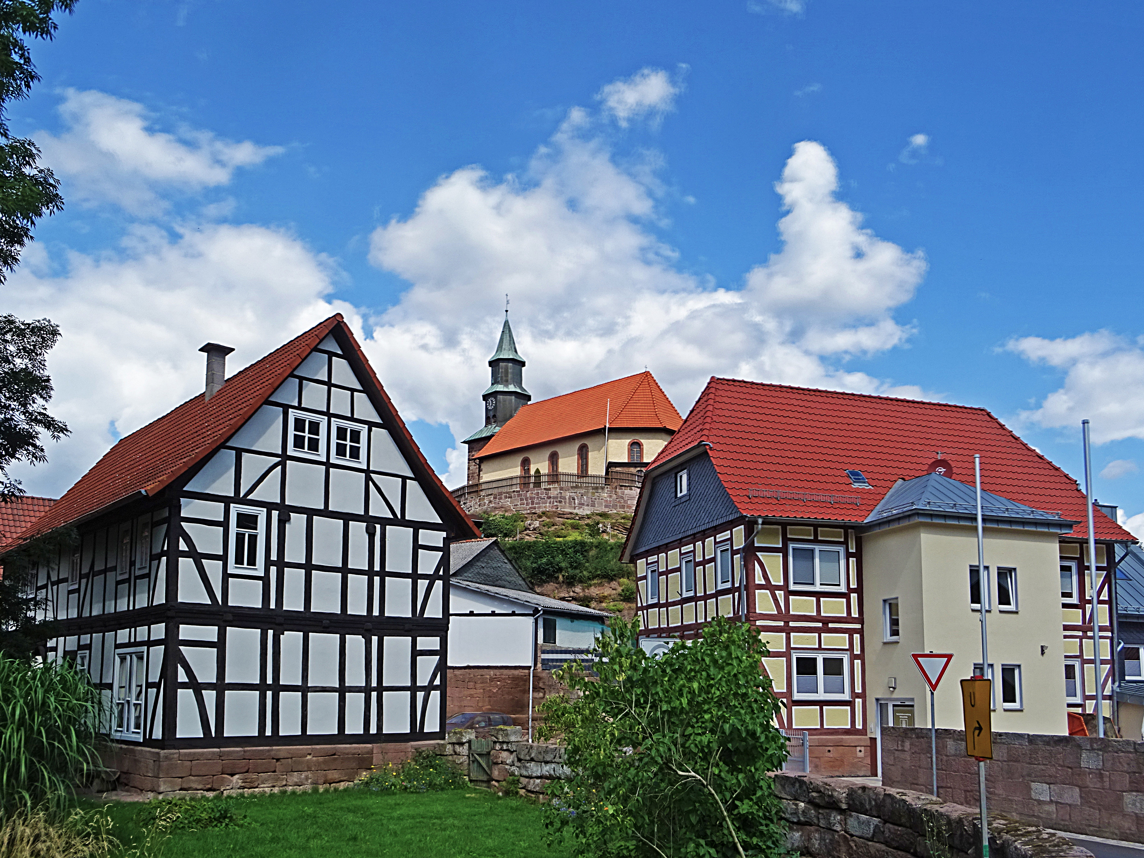 Birkenfelde